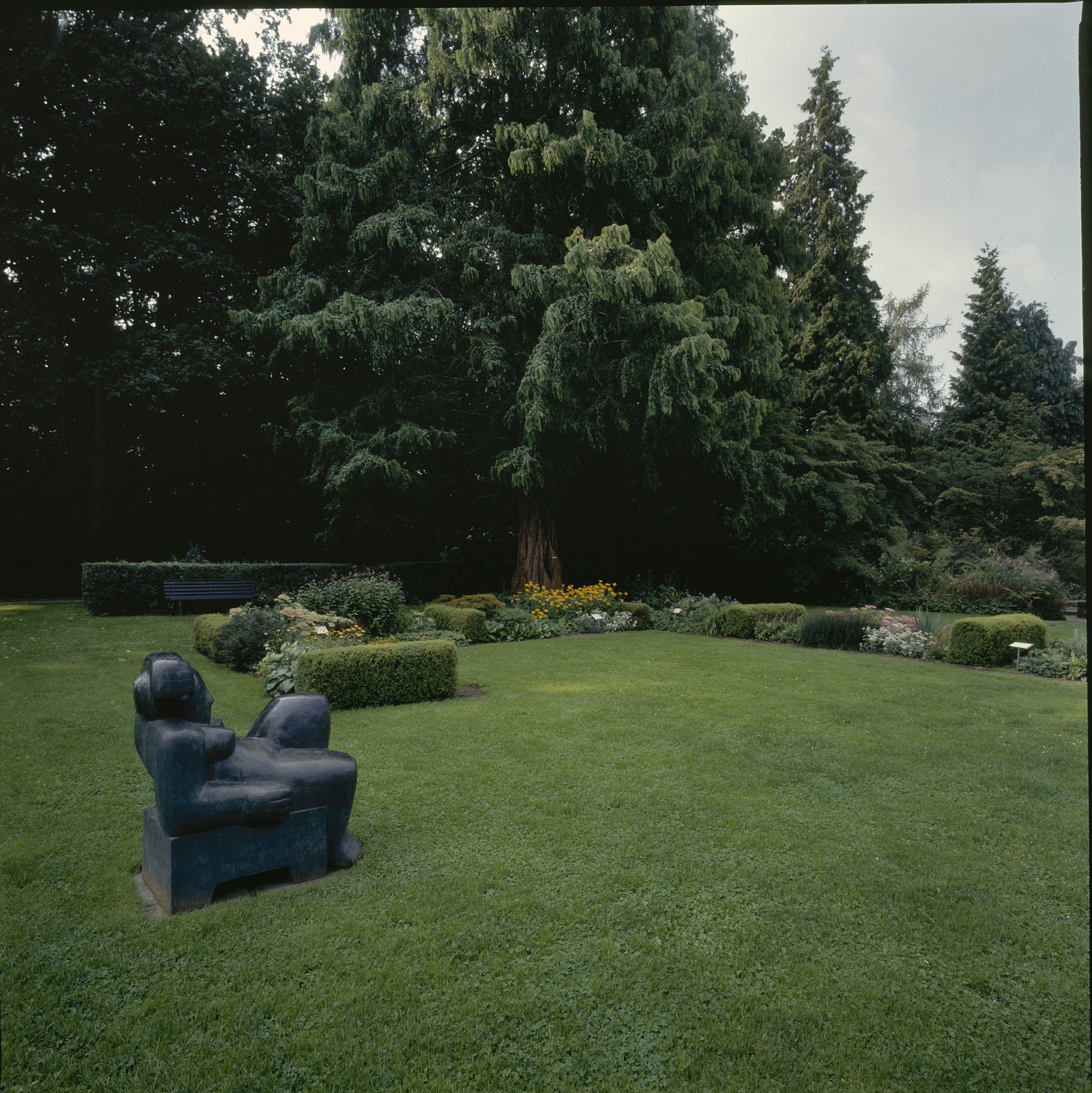 De tuinen van Mien Ruys: Overzicht van tuin met kunstwerk